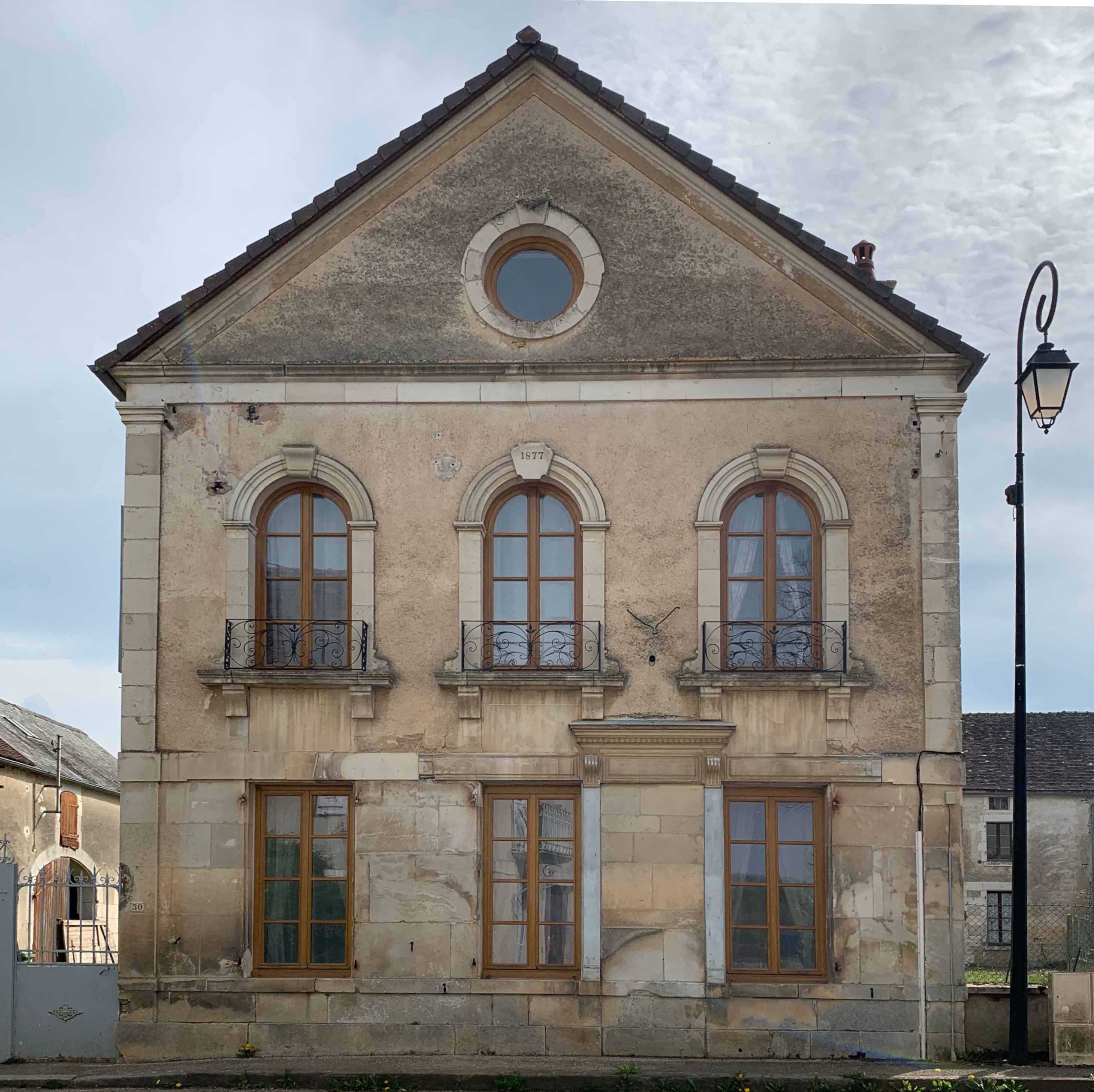 Ancienne mairie de Sougères-en-Puisaye (avril 2019).